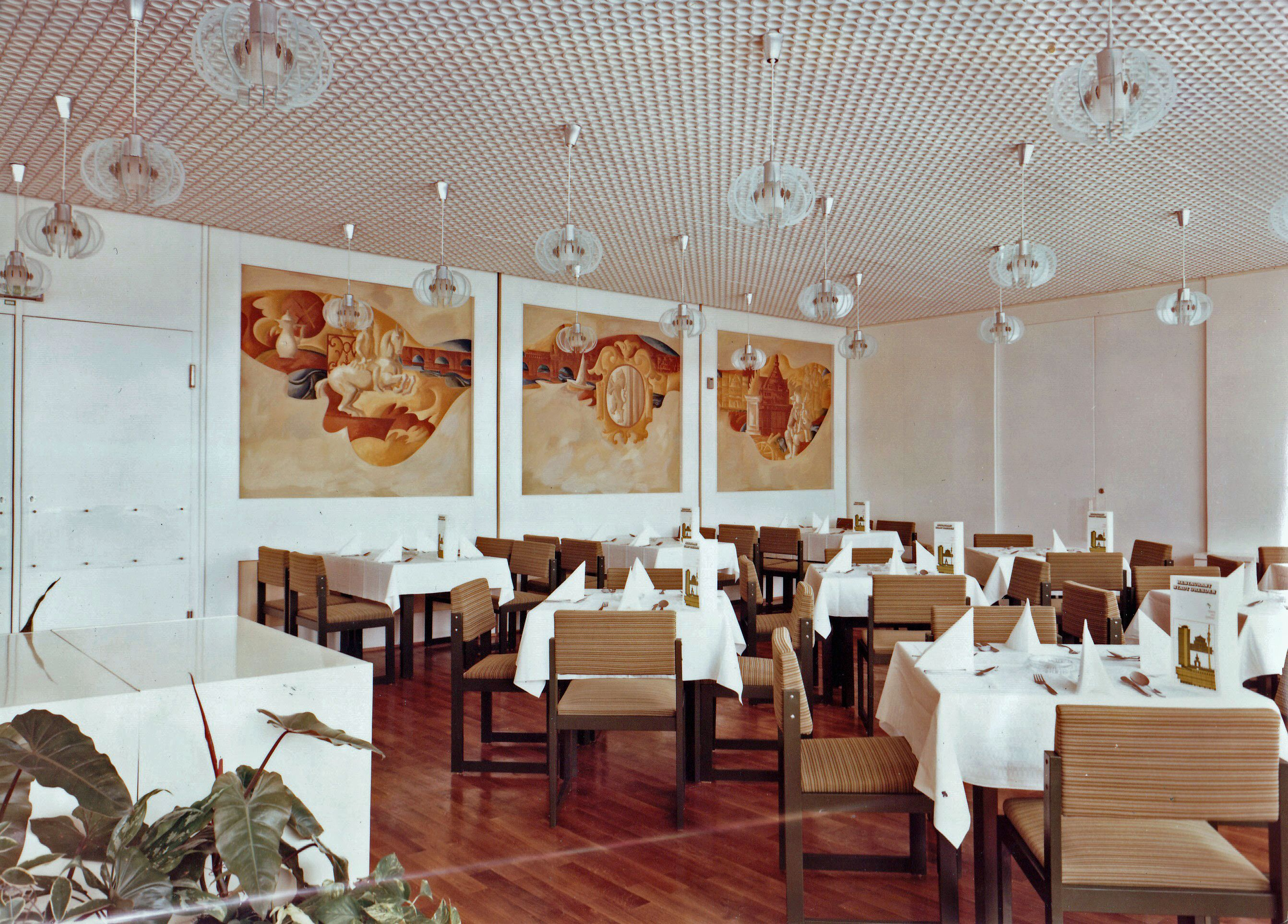 Restaurant "Stadt Dresden" in Leipzig mit Wandmalerei des sächsischen Malers und Grafikers Karl-Heinz Schmidt, 1974